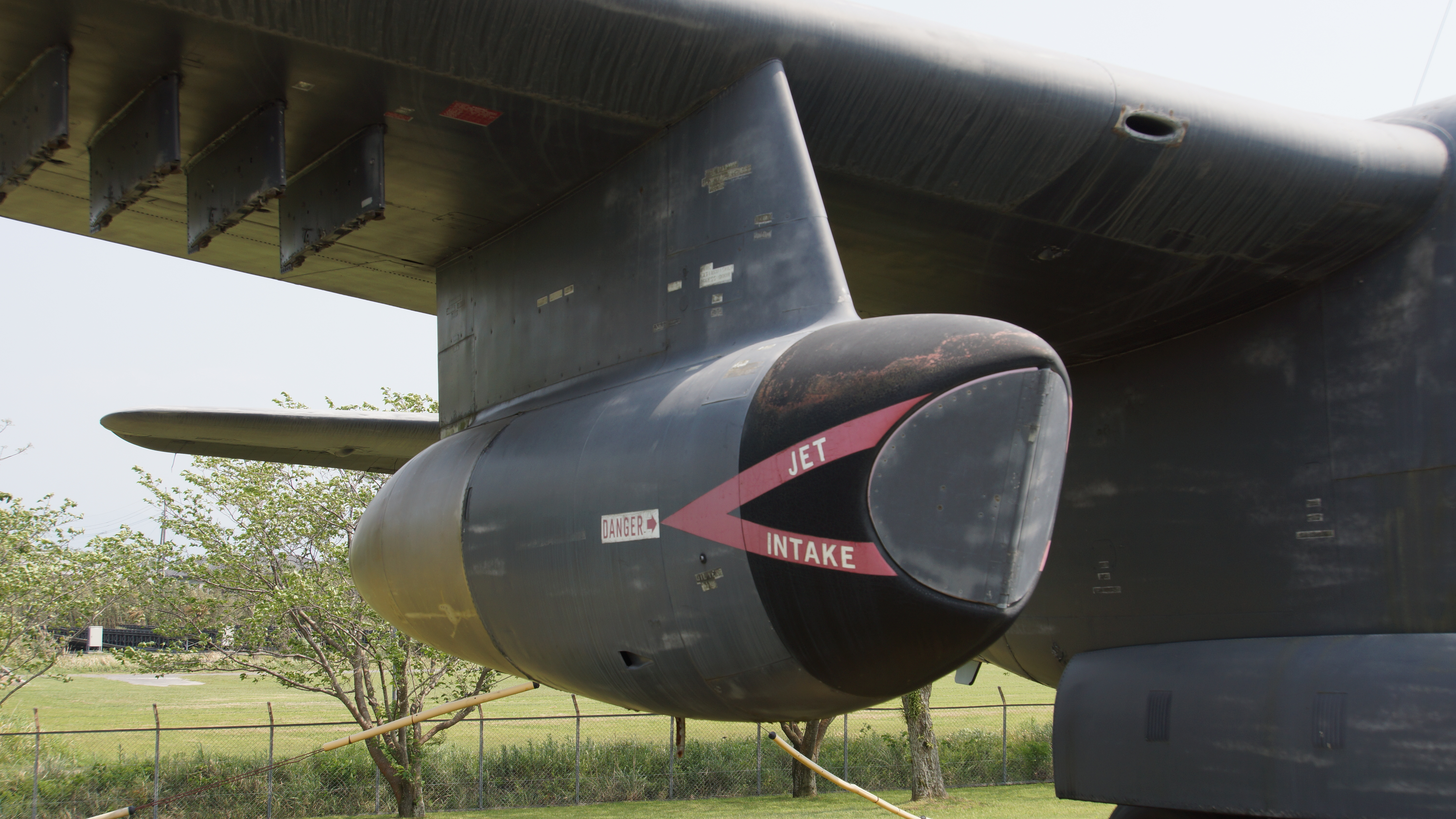 海上自衛隊 P-2J対潜哨戒機（4771号機） J3-IHI-7D補助ターボジェットエンジン（右主翼側） 右前面。2017年4月29日 海上自衛隊鹿屋航空基地史料館にて。